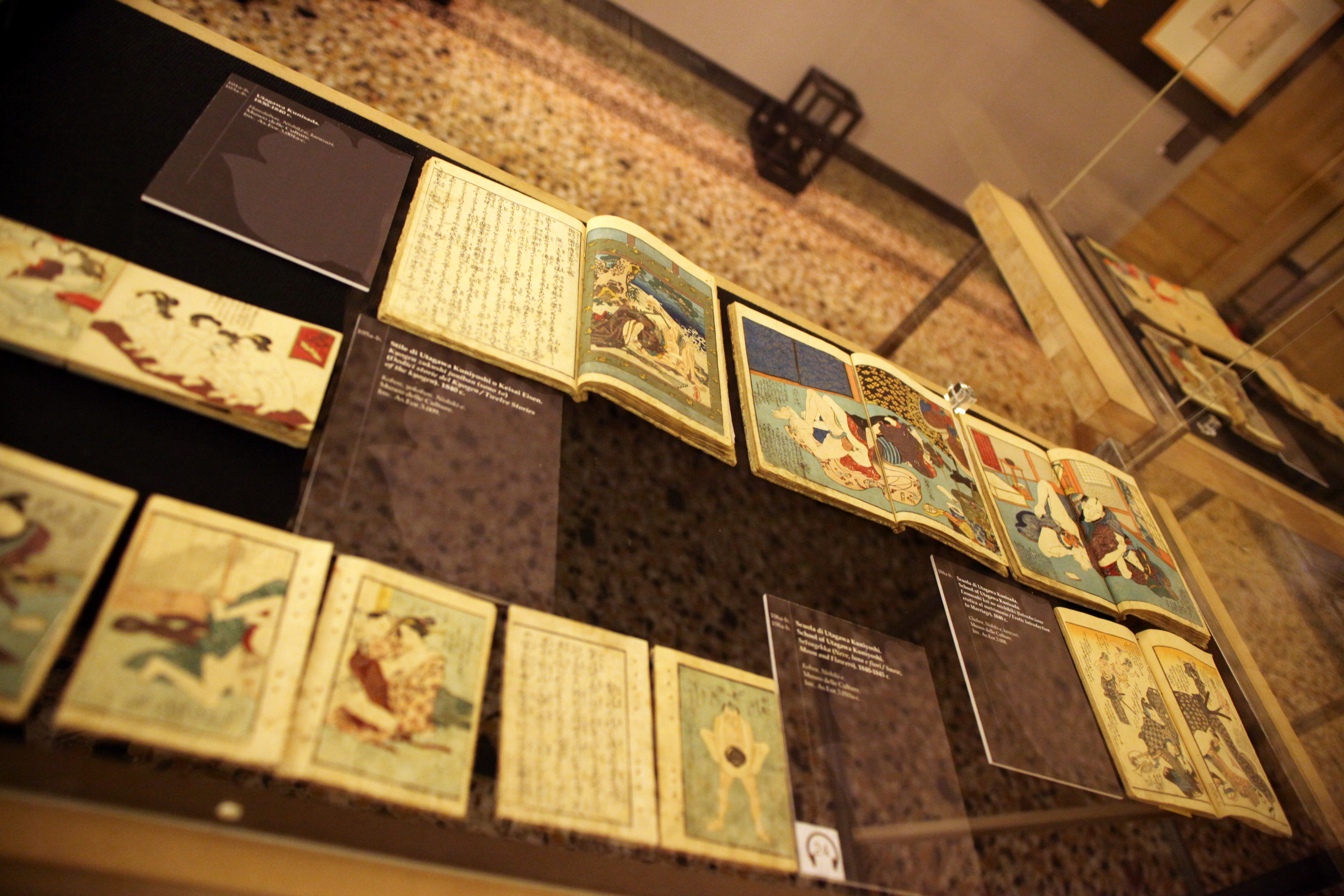 books in exhibition: Shunga Arte ed eros in Giappone nel periodo Edo Palazzo Reale, Milano dal 21 ottobre al 31 gennaio